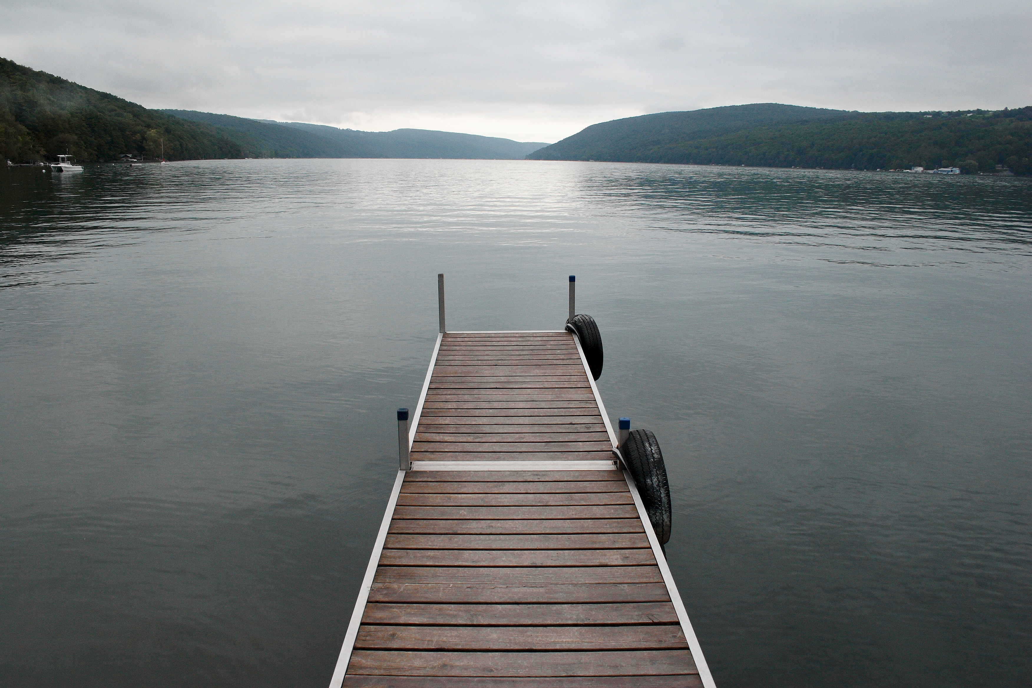 Skaneateles Lake, New York - pier